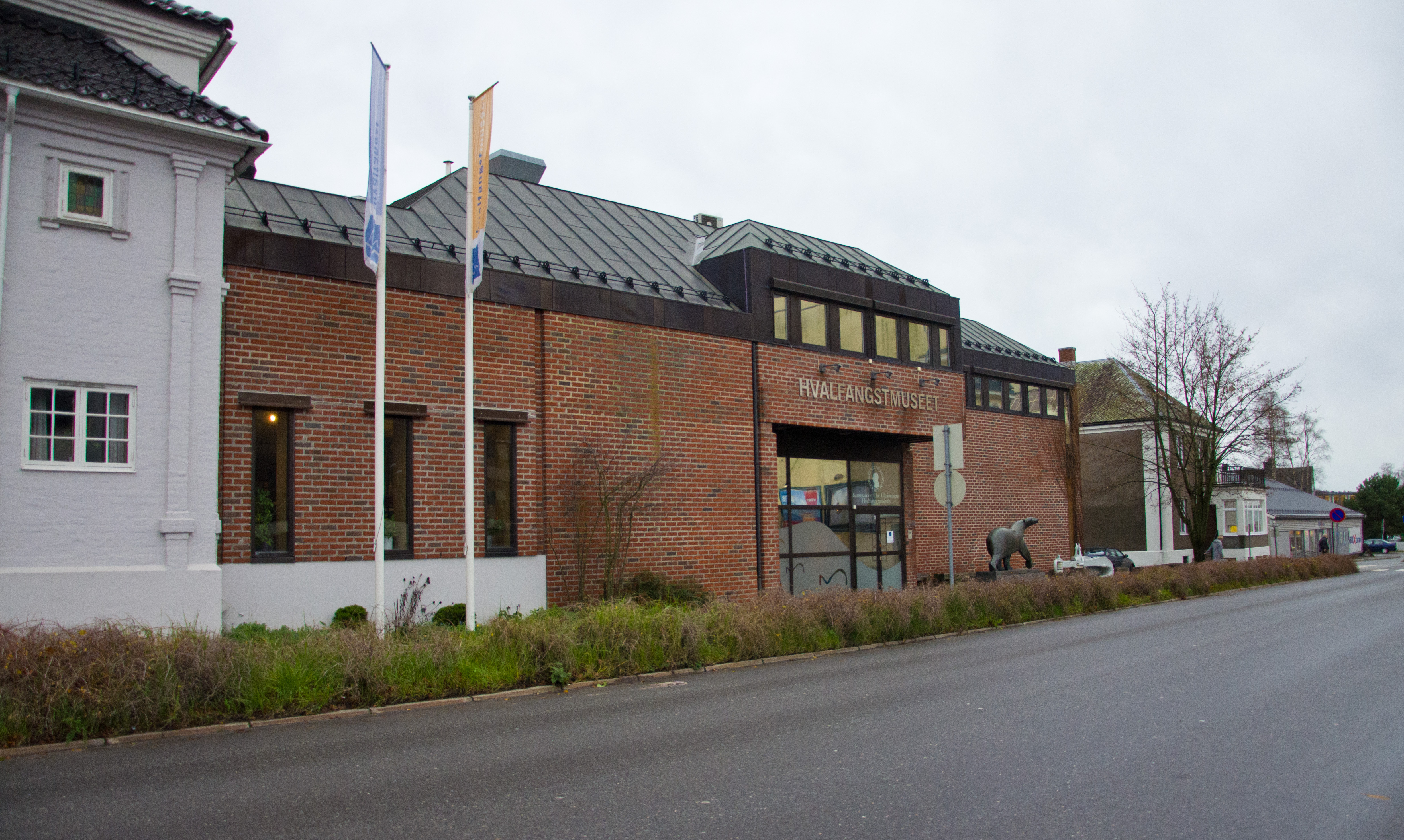 Hvalfangstmuseet i Sandefjord